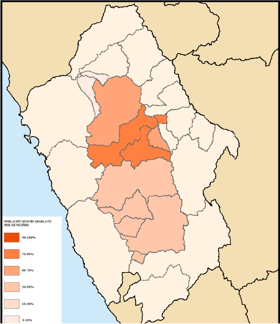 extensión quechua de huaylas